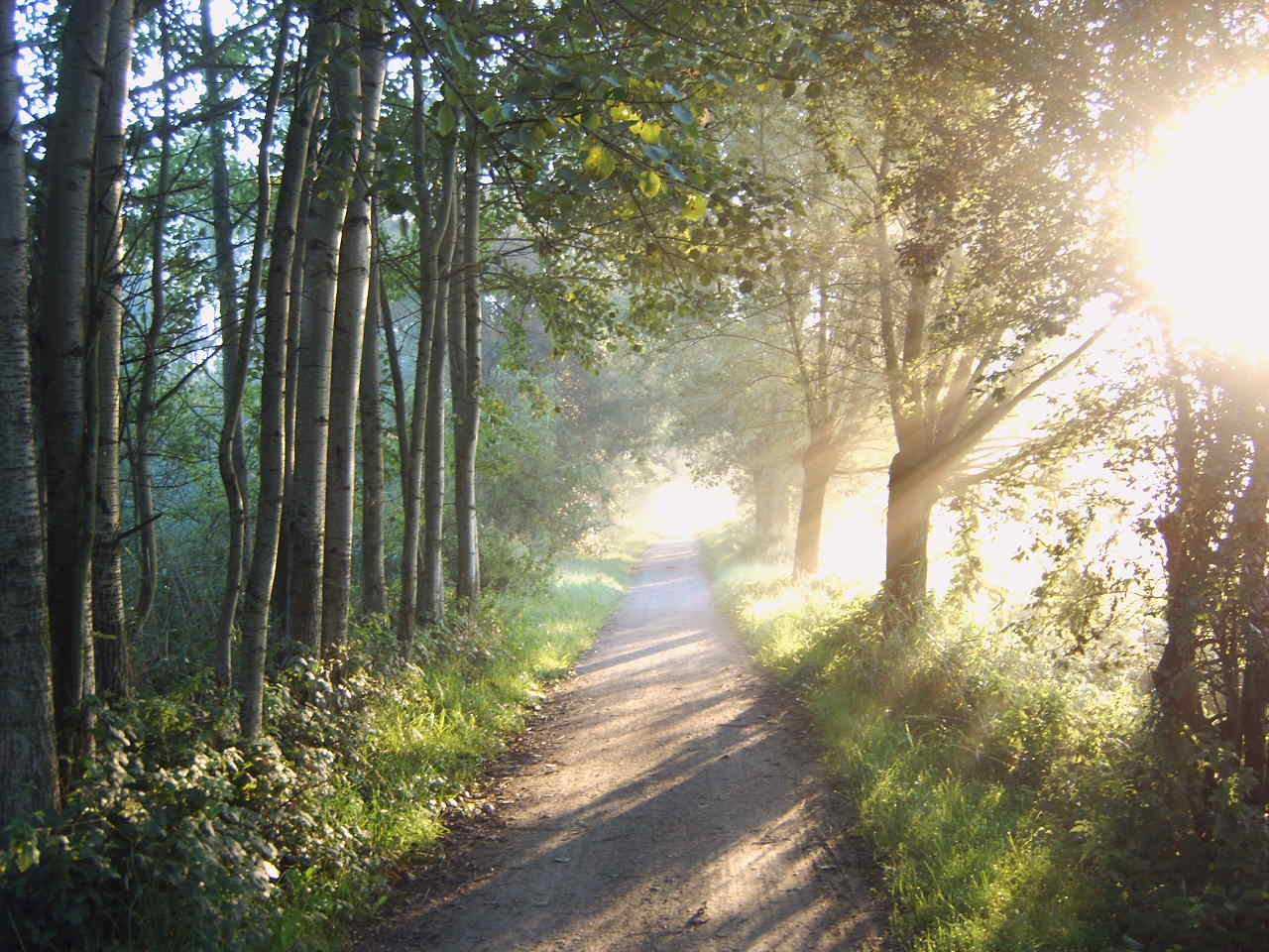 zonsopgang in natuurgebied Duursche Waarden bij Olst, gemaakt door Martin van Dalen op 6 september 2004